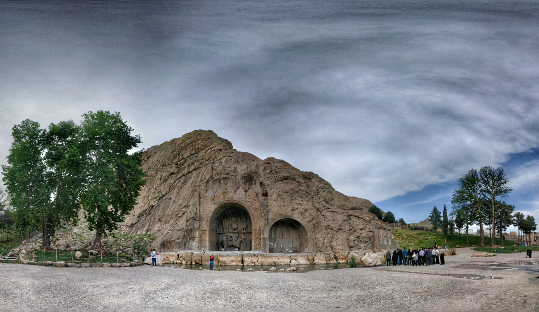 طاق بستان